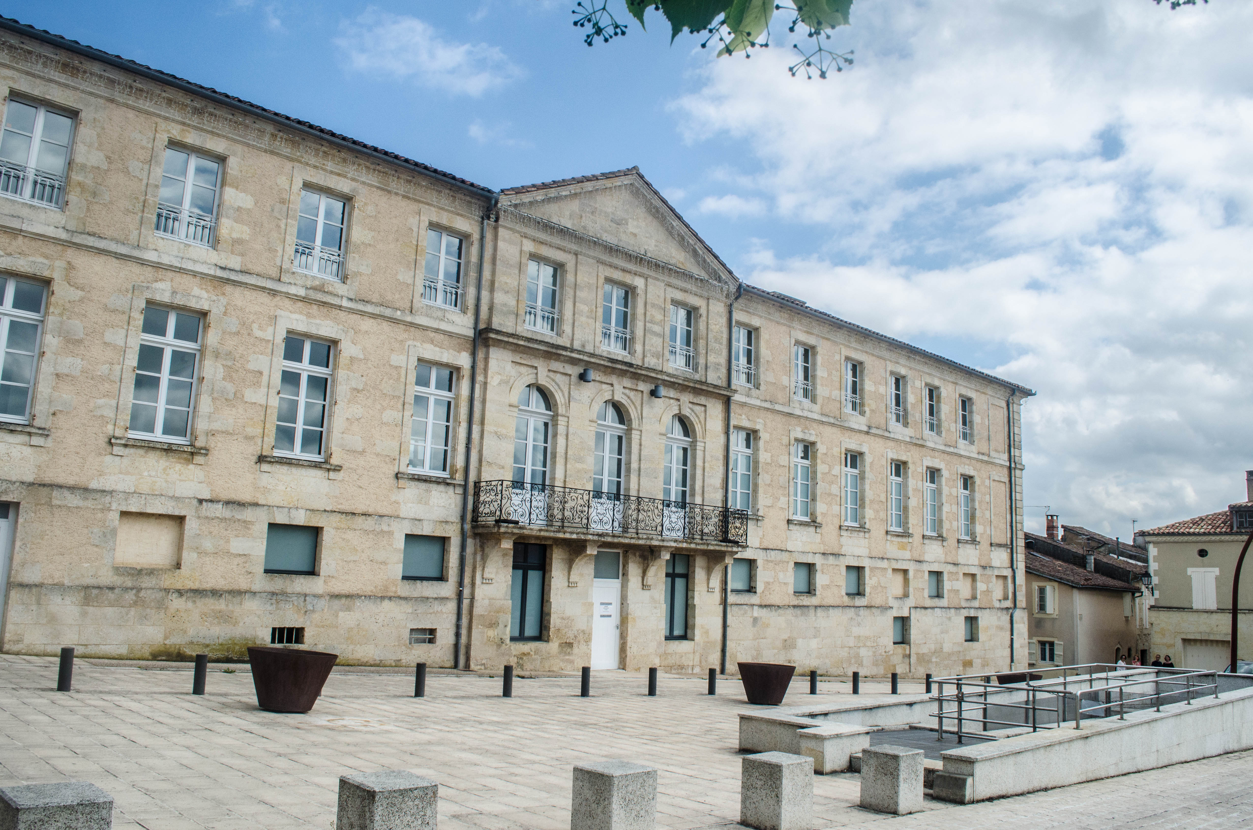 Lectoure, Gers, France. Ancien hôtel Goulard, situé sur la place Boué de Lapeyrère, à l’angle de la rue Nationale, il abrite les thermes de Lectoure.